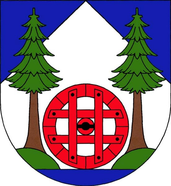 Albrechtice v Jizerských horách - znak